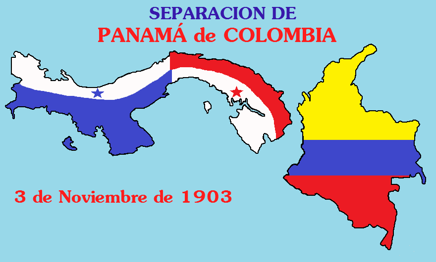 Separación de Panamá